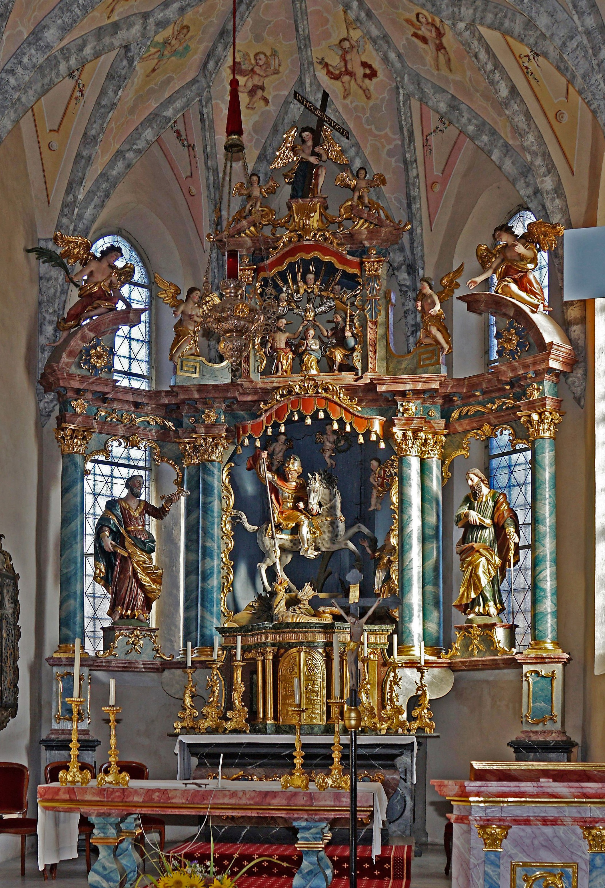 Pfarrkirche St. Georg (Feistritz an der Drau), barocker Hochaltar, im Schrein der hl. Georg